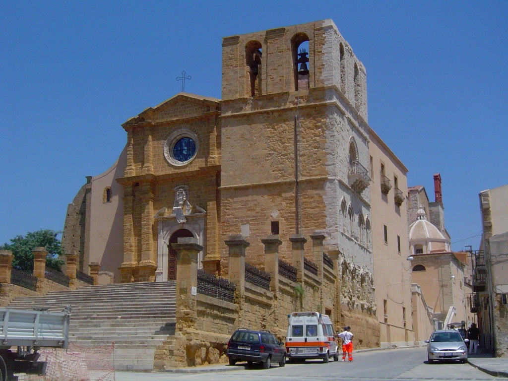 Il Duomo di Agrigento